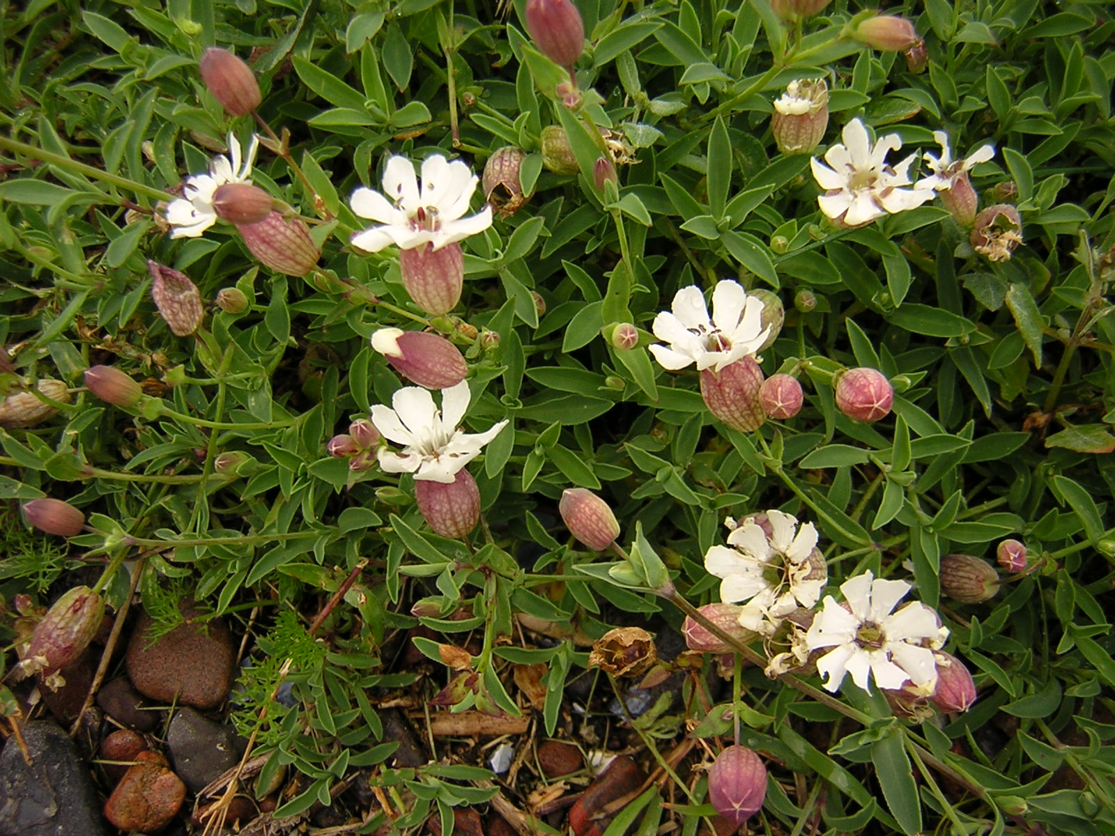 Silene uniflora Source [1]